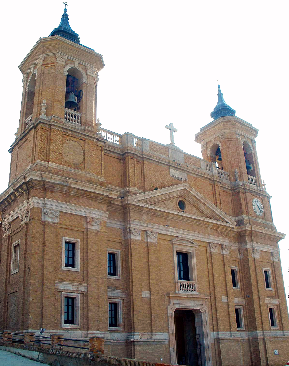 Church of Santa María la Mayor, Épila (Zaragoza)